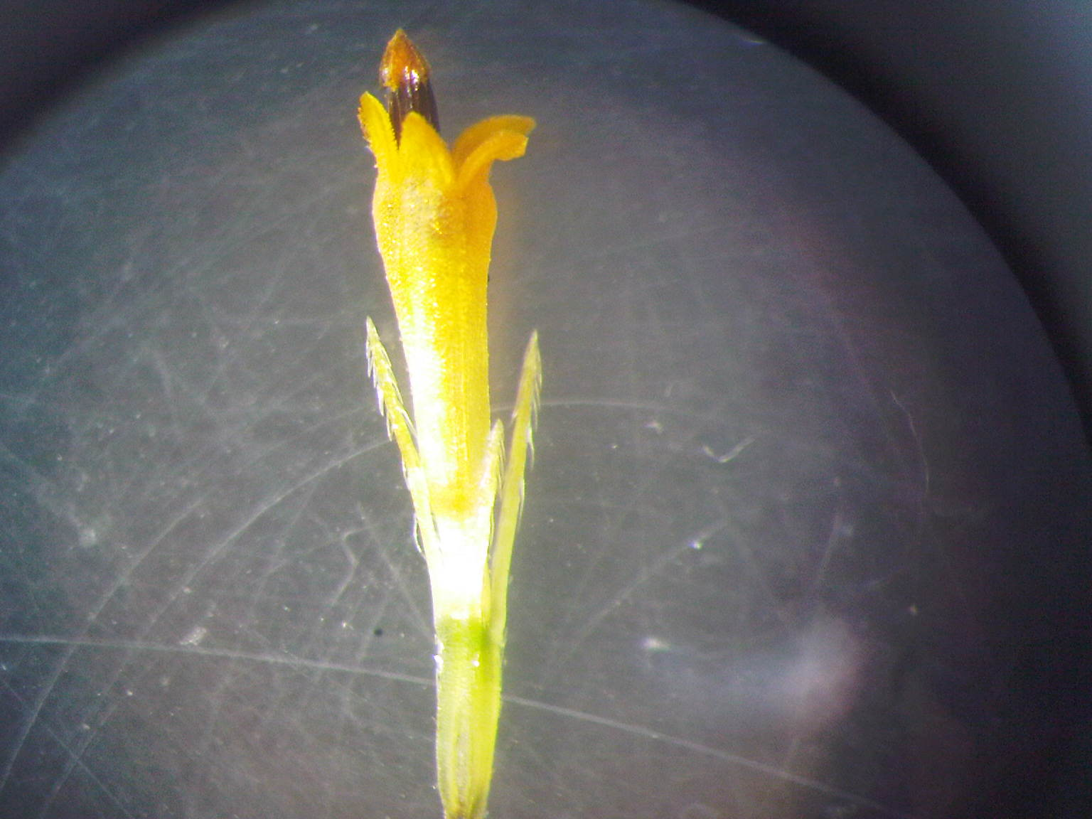 Flor del disco de la inflorescencia que dará origen a la semilla